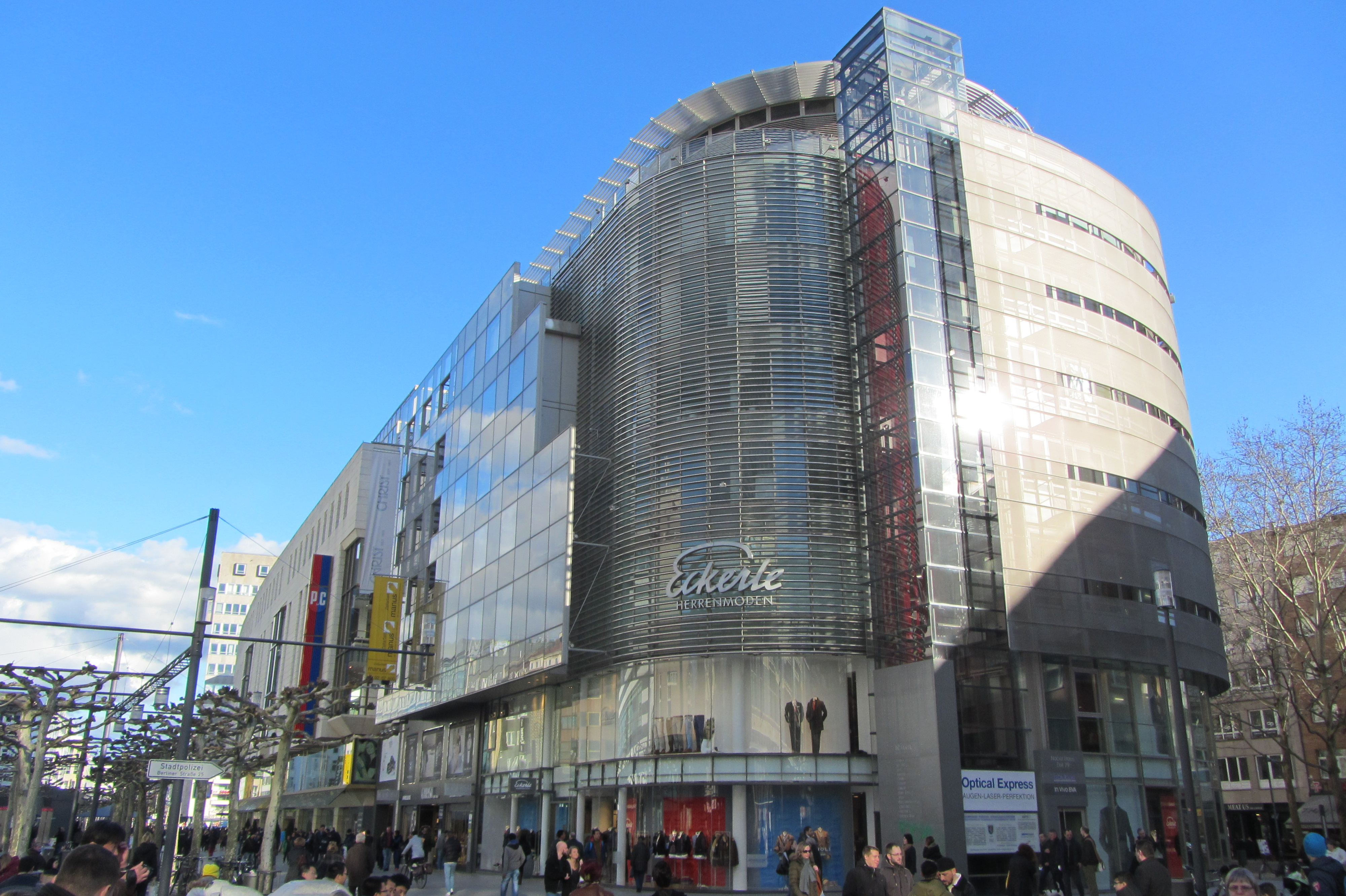 Nobel Haus an der Zeil